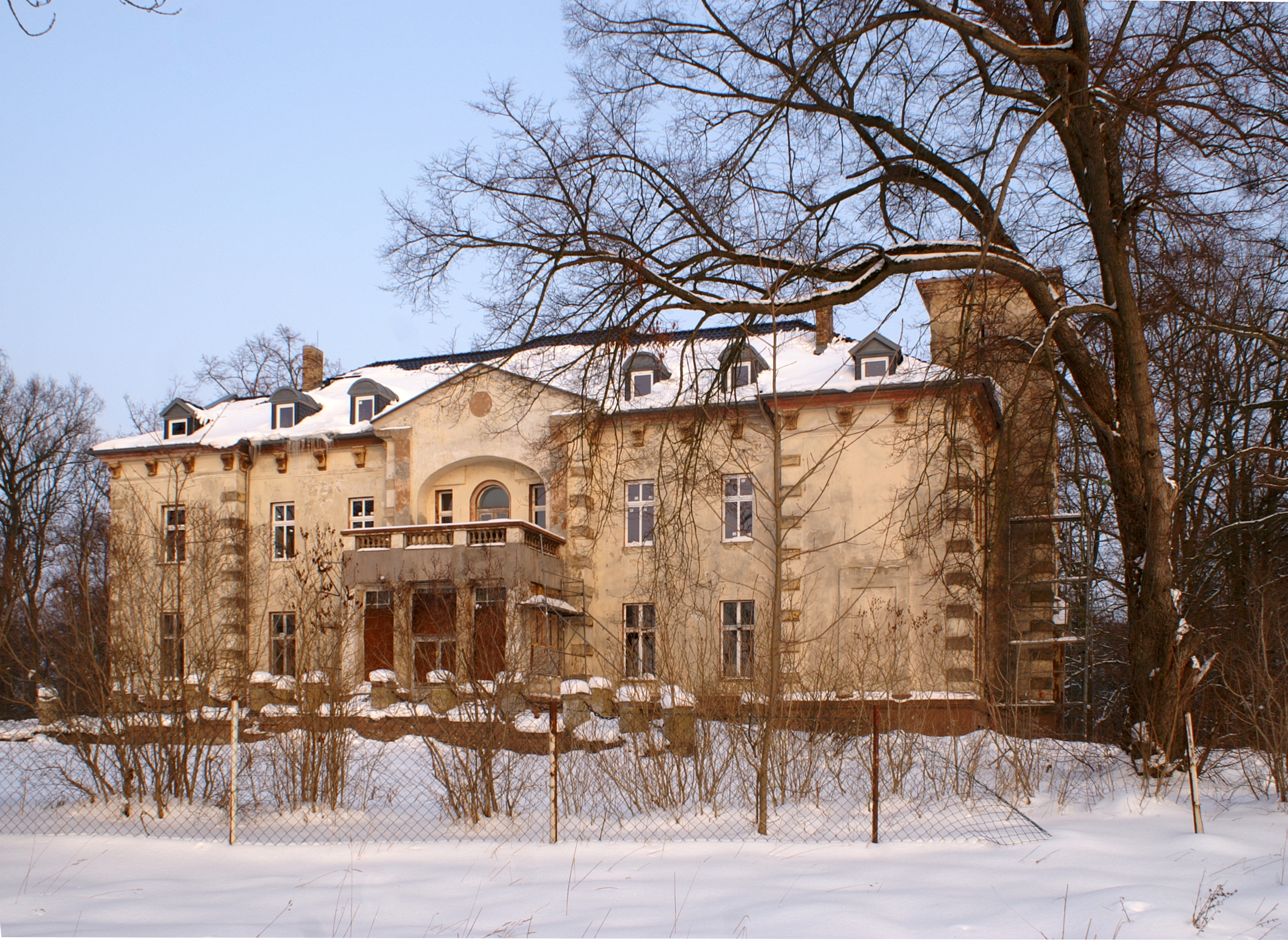 Herrenhaus in Hohenbrünzow, Westseite